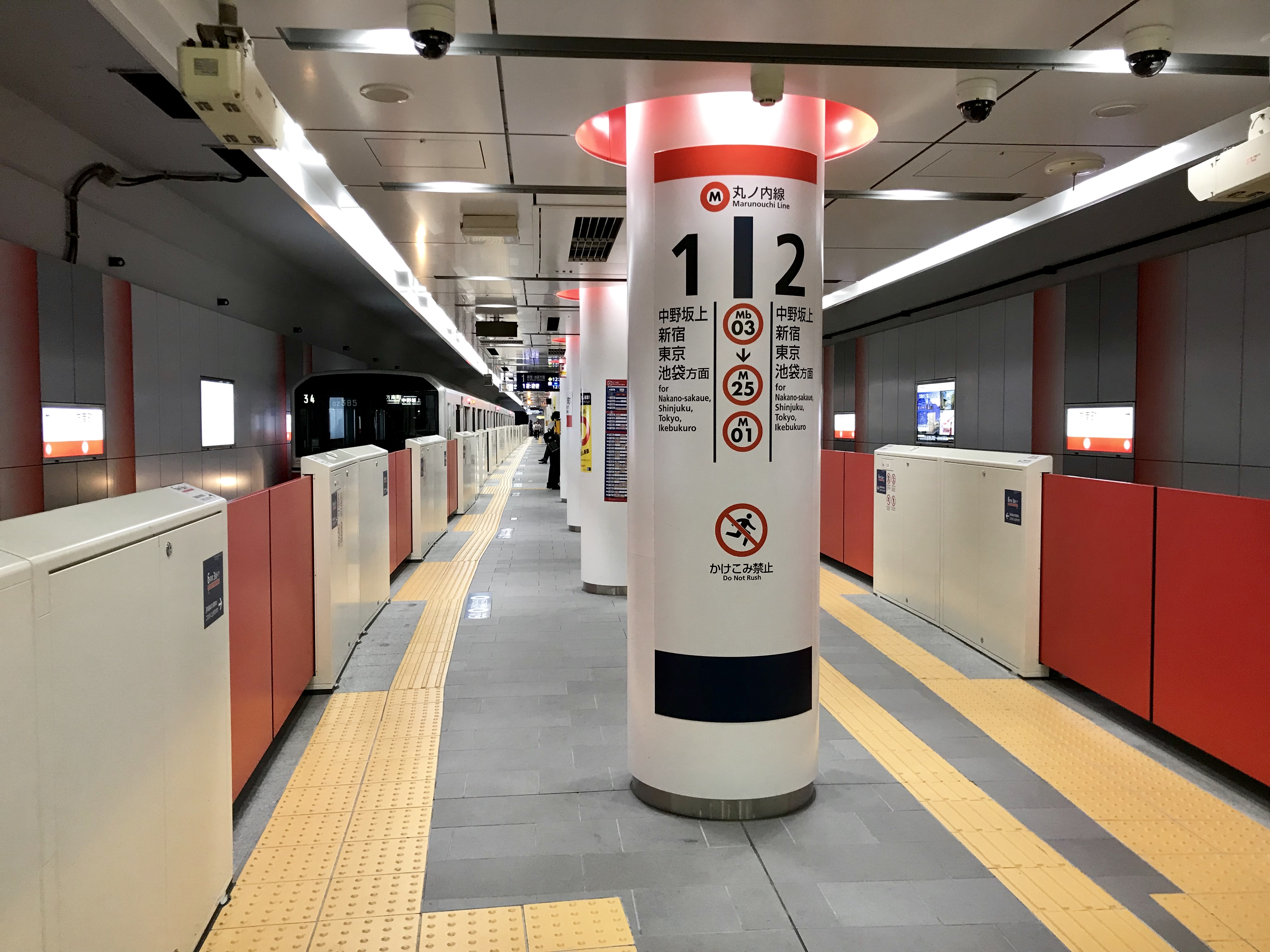 東京メトロ丸ノ内線方南町駅方南町駅ホーム（リニューアル後）